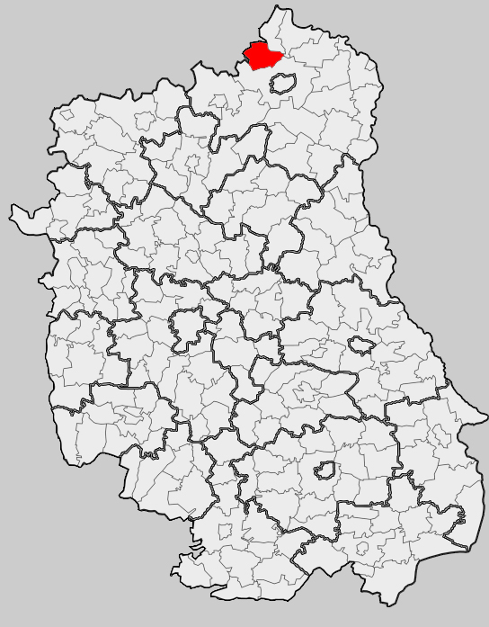 Map of gmina Leśna Podlaska, Biała Podlaska county, Lublin voivodship Mapa gminy Leśna Podlaska, powiat bialski, województwo lubelskie